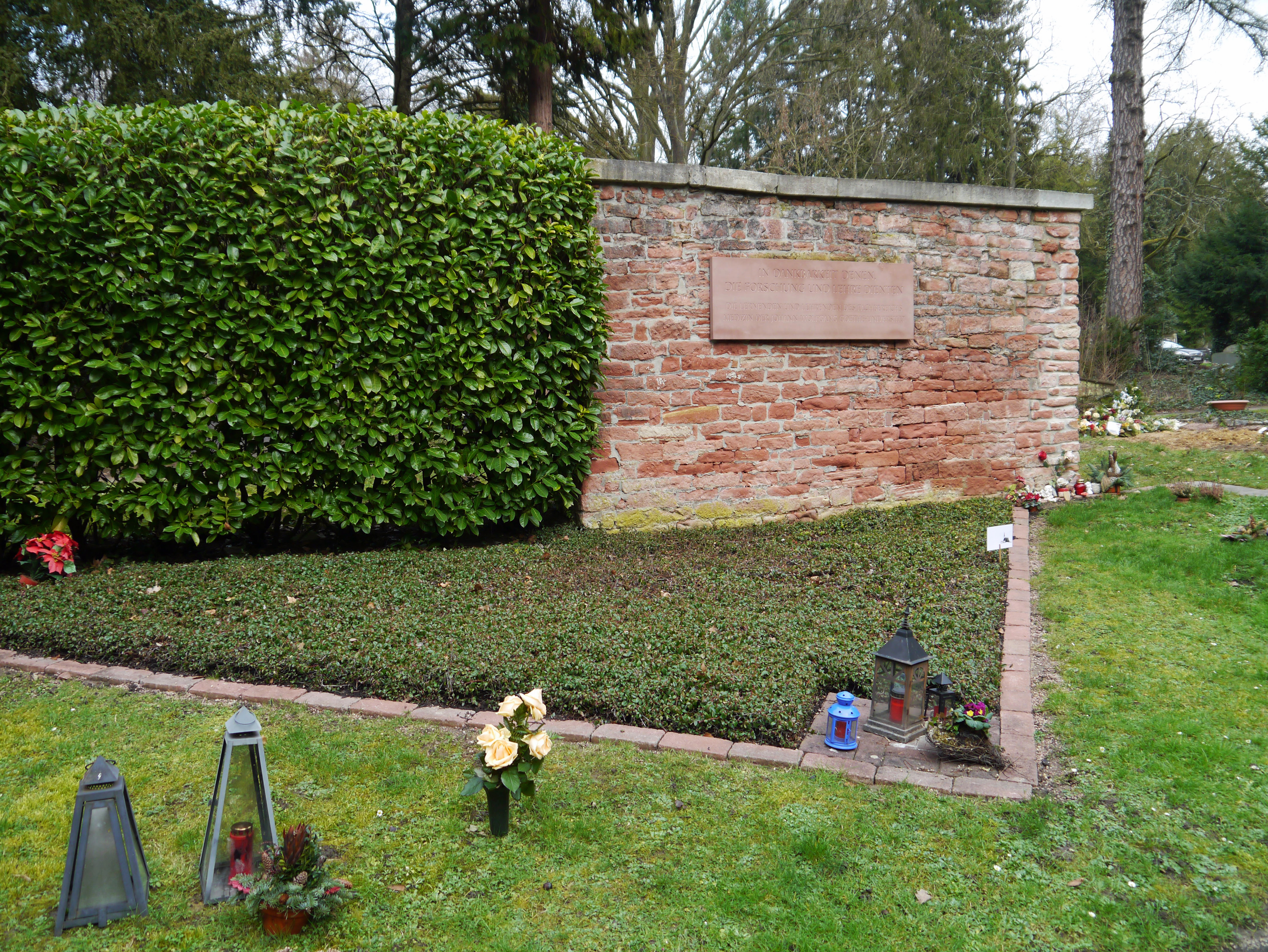 Grabstätte der Körperspender auf dem Frankfurter Hauptfriedhof.